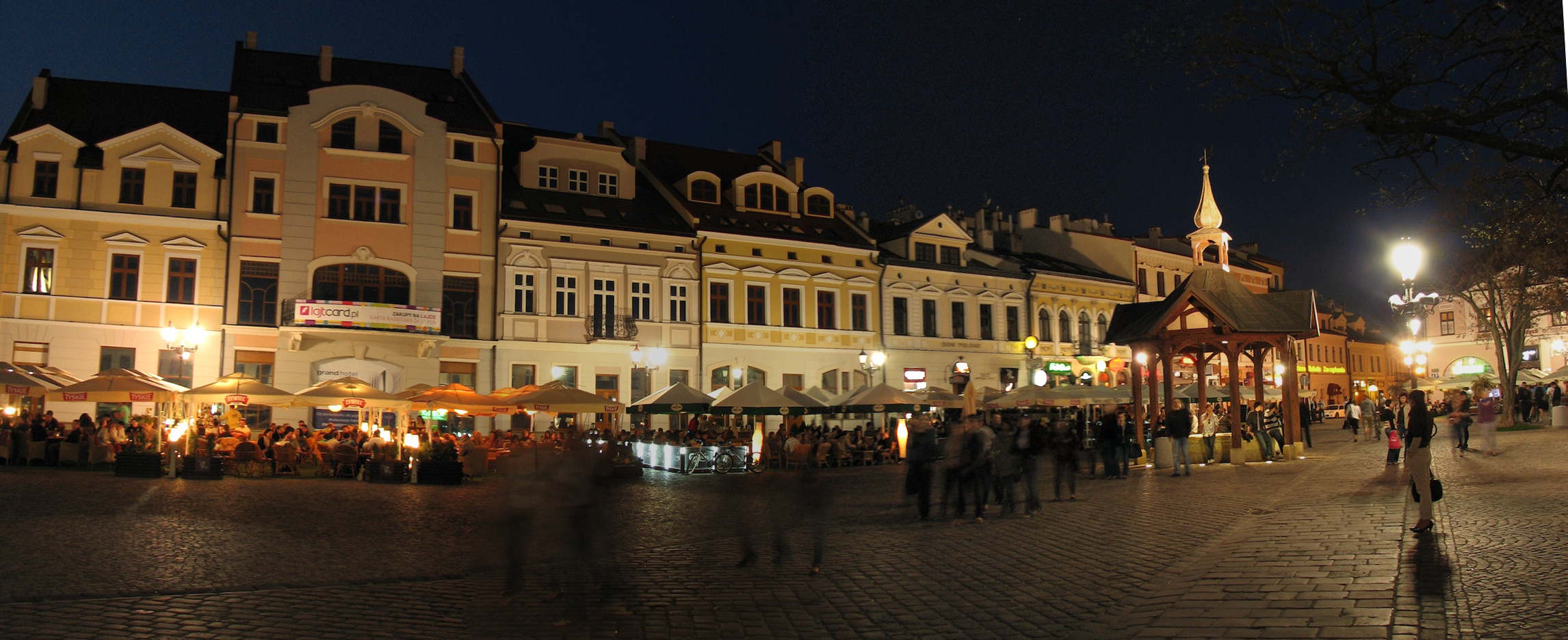 Rynek w Rzeszowie nocą.